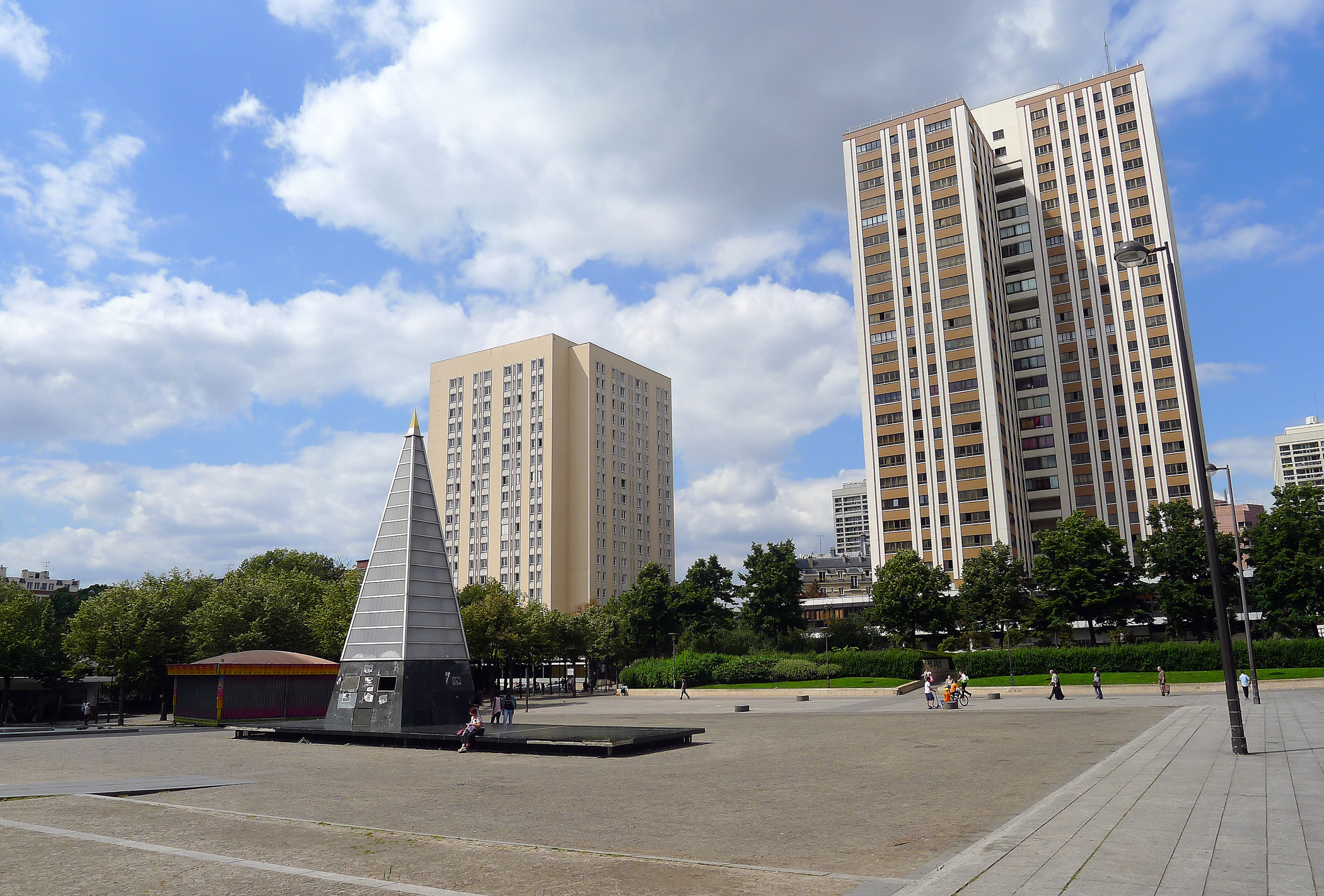 Place des Fêtes (parvis central) - Paris XIX